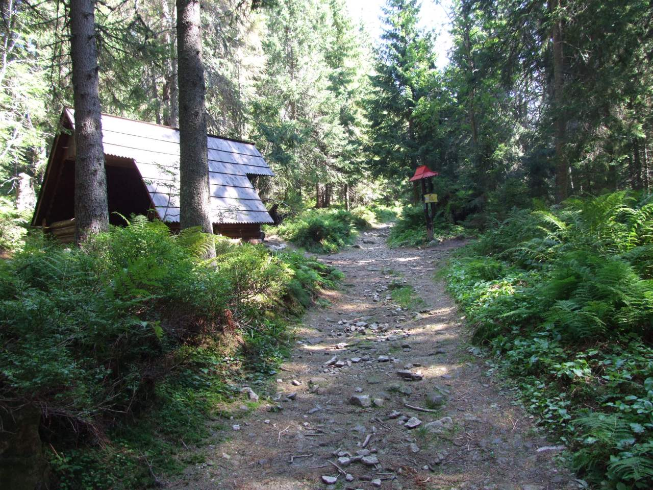 Rozdroże pod Hlińska doliną w Dolinie Koprowej